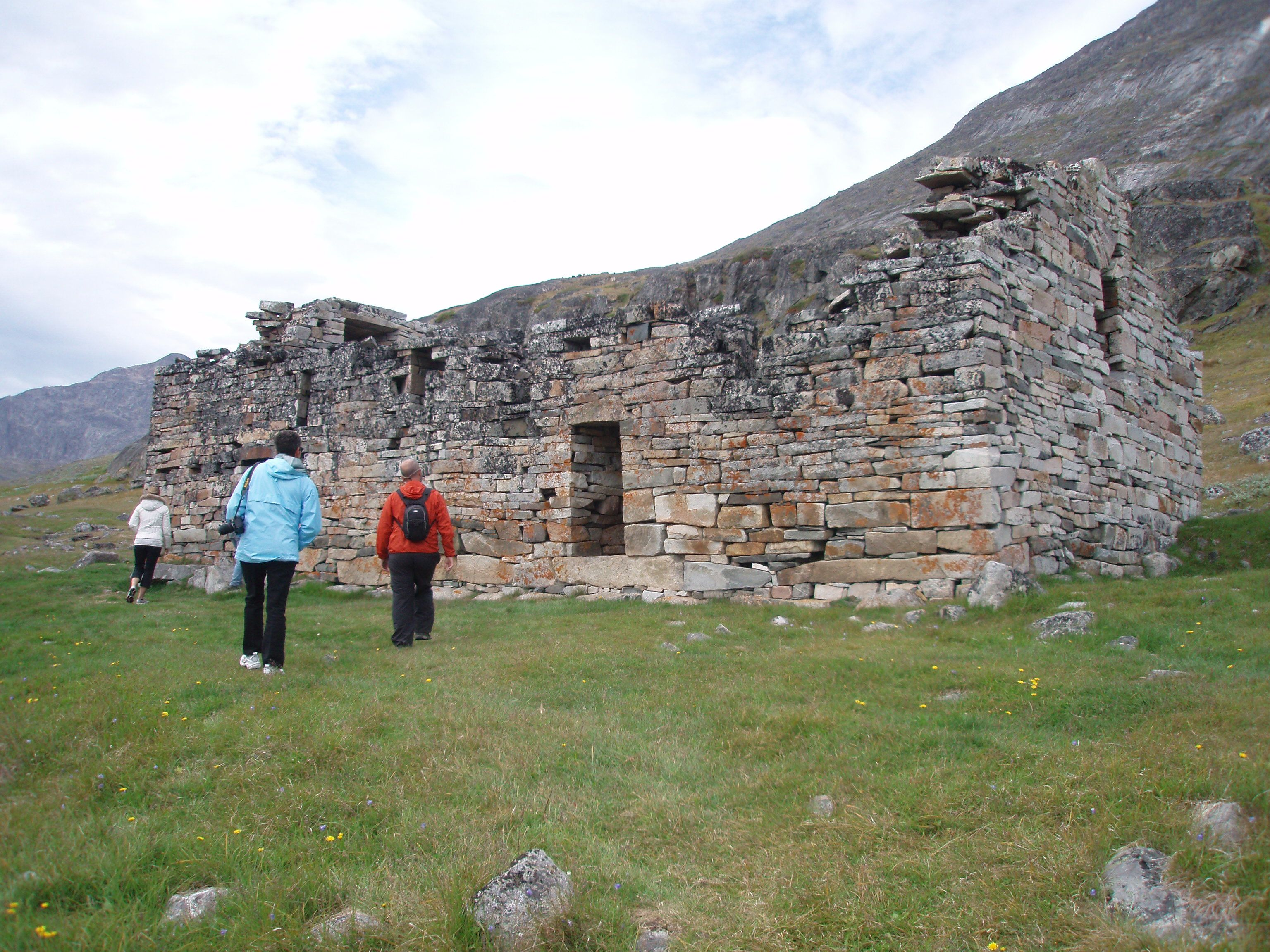 Ella Groedem 54